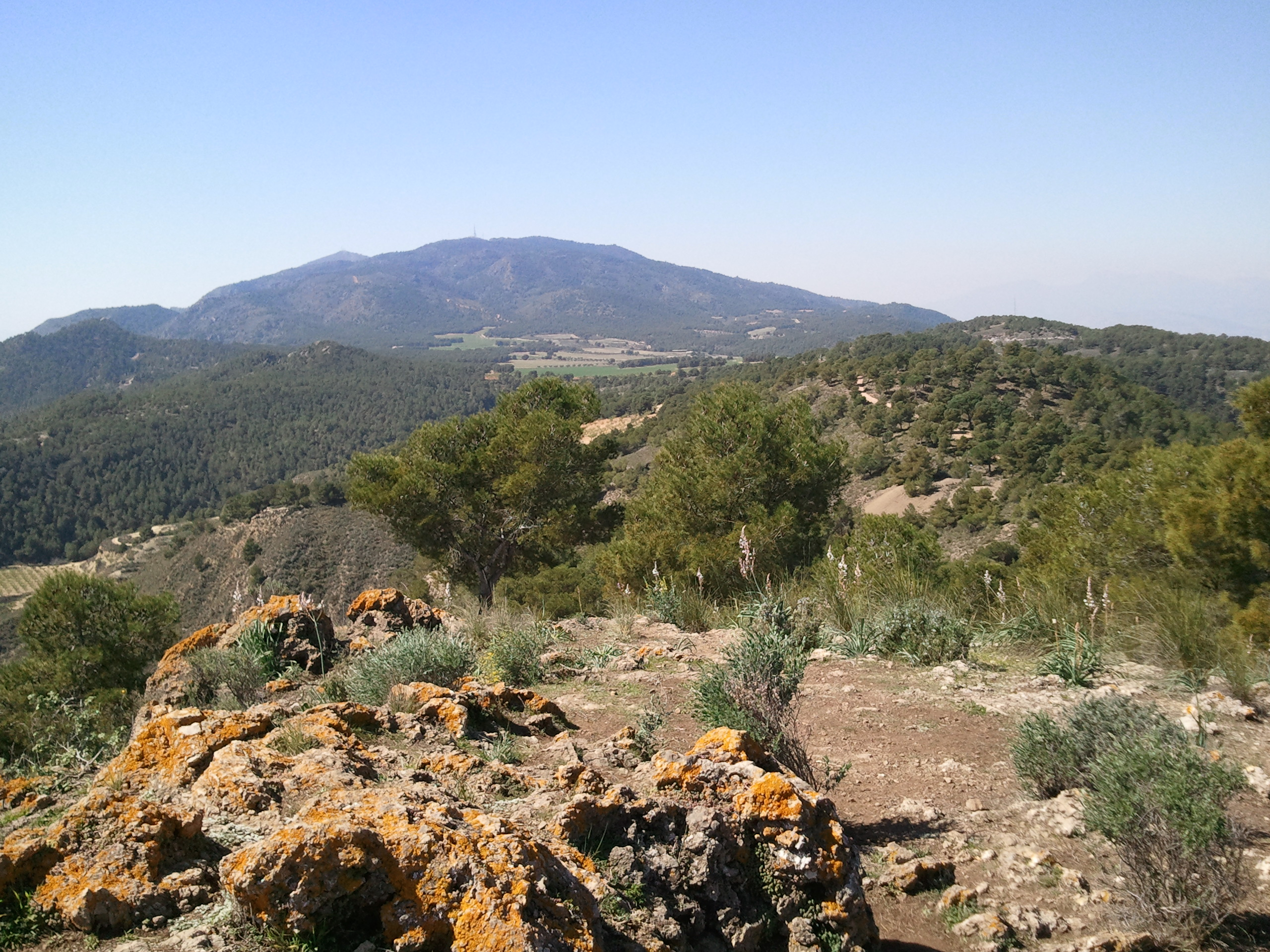 Carrascoy y El Valle This is a photography of a Special Area of Conservation in Spain with the ID: ES6200002. Natura2000 entry, EEA entry